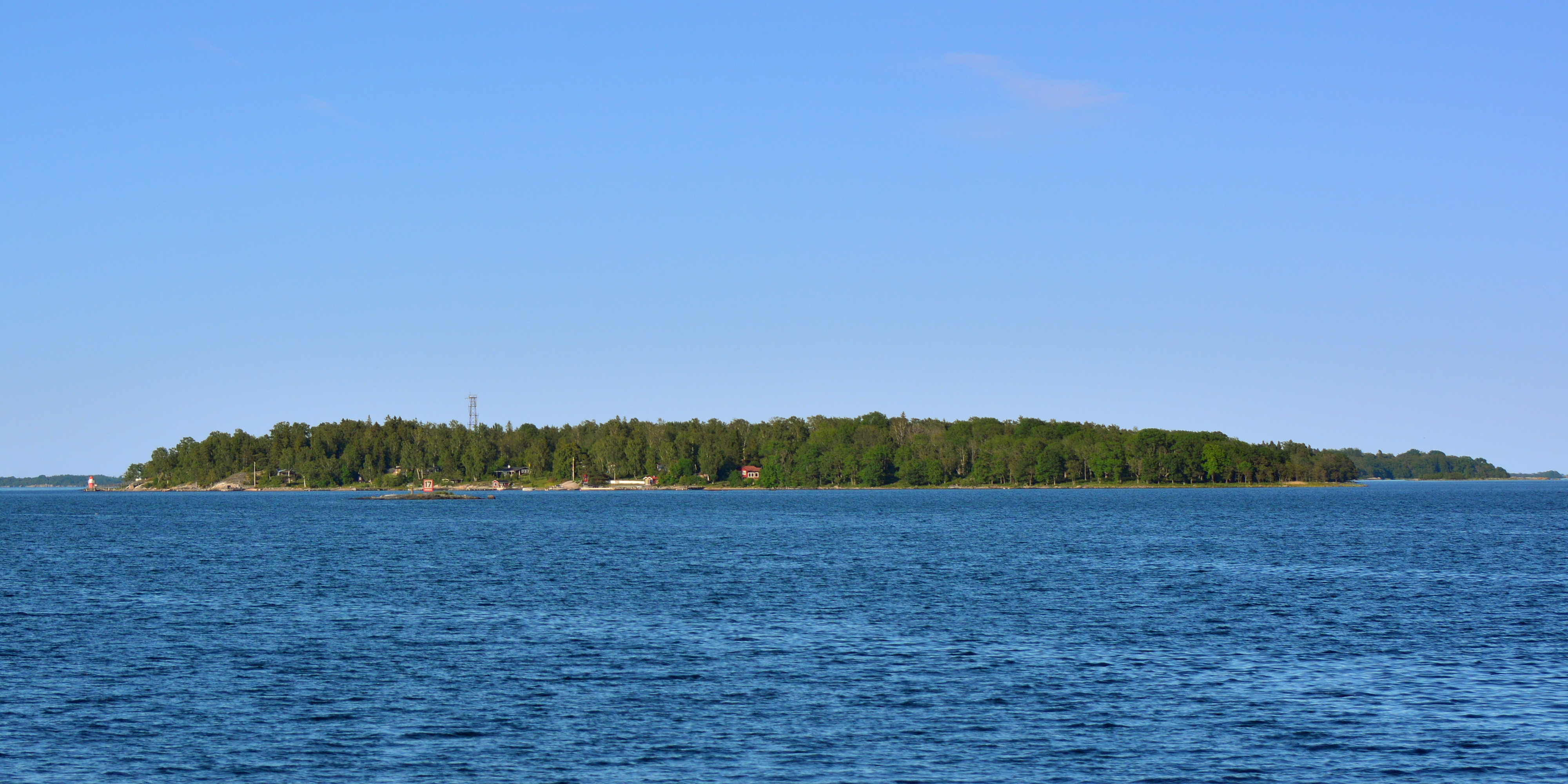 Ön Marö söder om Rådmansö i Stockholms norra skärgård.